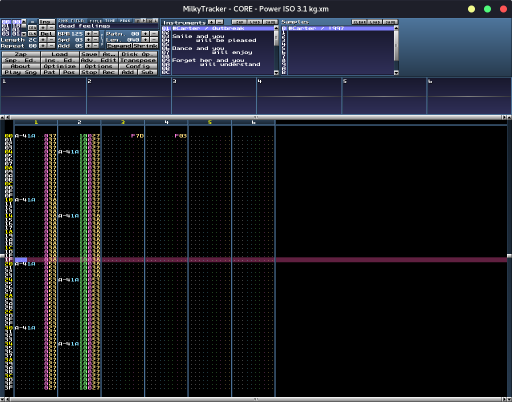 Captura de pantalla de Milkytracker